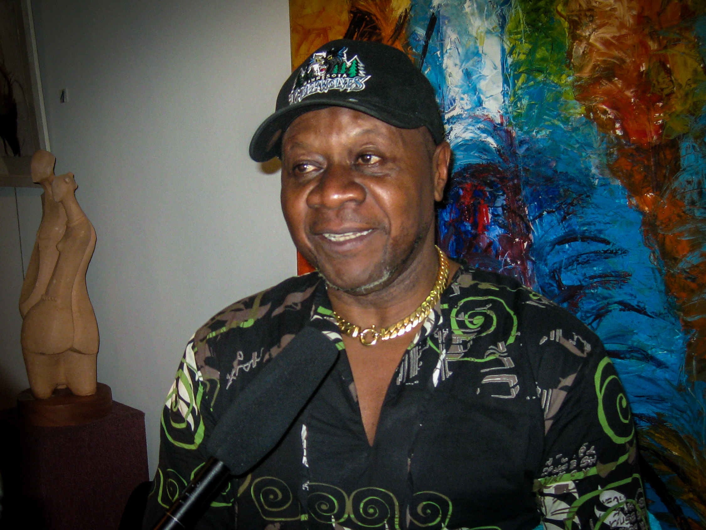 Papa Wemba, chanteur congolais